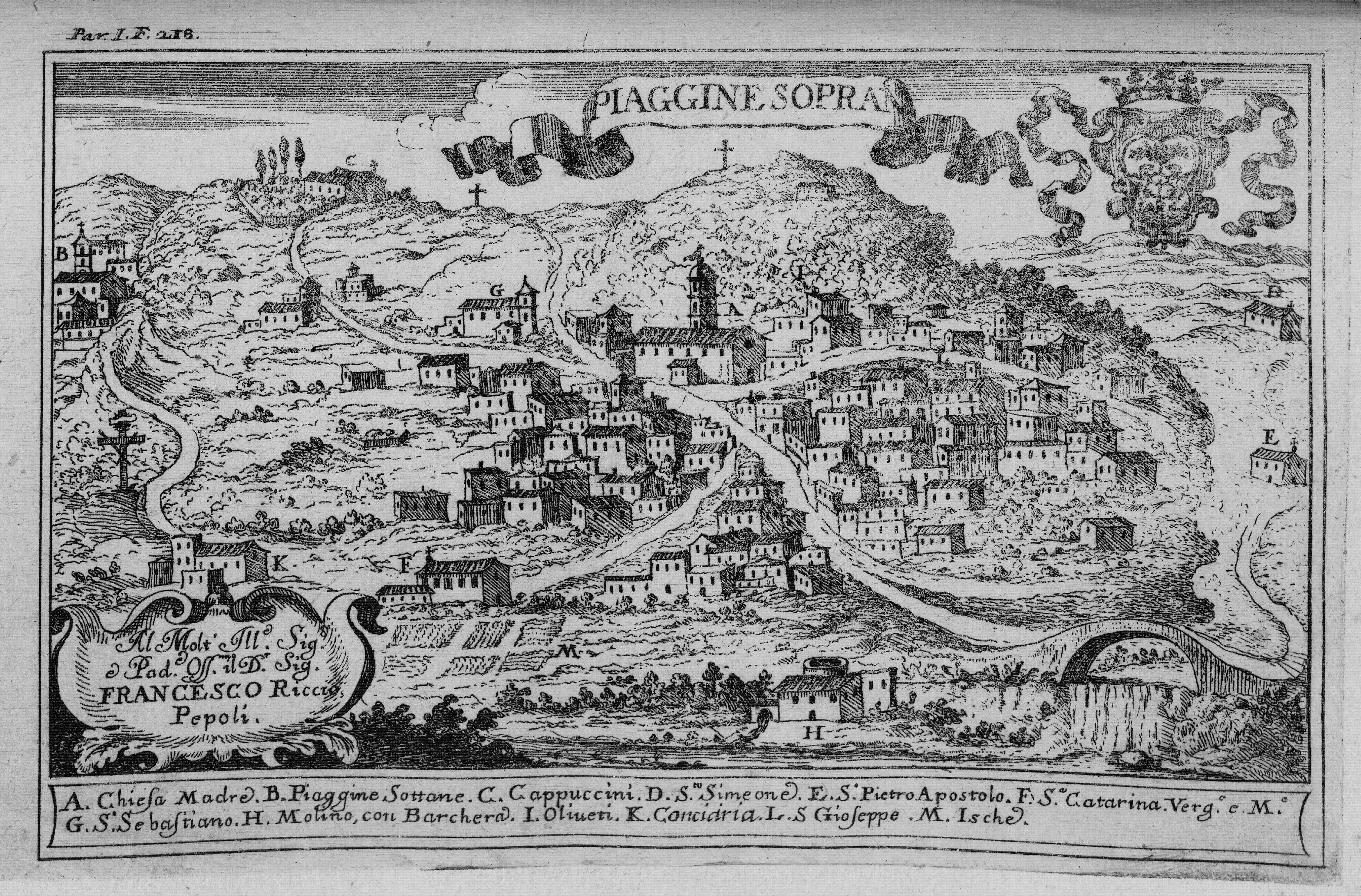 Autor: Pacichelli, Giovanni Battista, 1641-1702 Descripción bibliográfica: Il regno di Napoli in prospettiva : diviso in dodeci provincie, in cui si descrivono la sua Metropoli Fidelissima città di Napoli ... Opera postuma divisa in tre parti / dell'abatte Gio. Battista Pacichelli ; Parte prima [-terza] ... Del regno di Napoli in prospettiva / dell'abate Pacichelli. Parte prima. - In Napoli : nella Stamperia di Michele Luigi Mutio, 1703. - v. : principalmente il.; 4º . - Inic. adorn. y frisos dec. - Grab. calc. y h. pleg. grab. calc. de mapas de Cassianus de Silva. Ilustrador: Cassiano De Silva, Francesco, il. Impresor: Muzio, Michele Luigi, imp. Lugar de impresión: Italia. Nápoles Localización: Vea la ilustración en su contexto